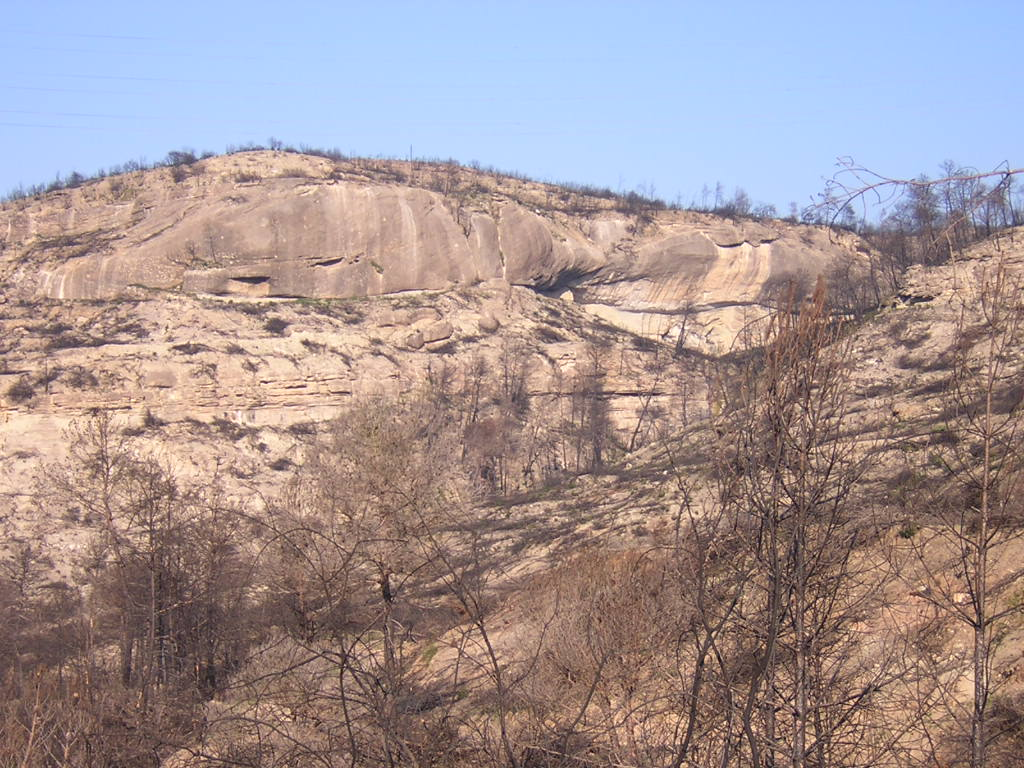 Cingles de l'Estoviada (Monistrol de Calders, Moianès, i Talamanca, Bages)